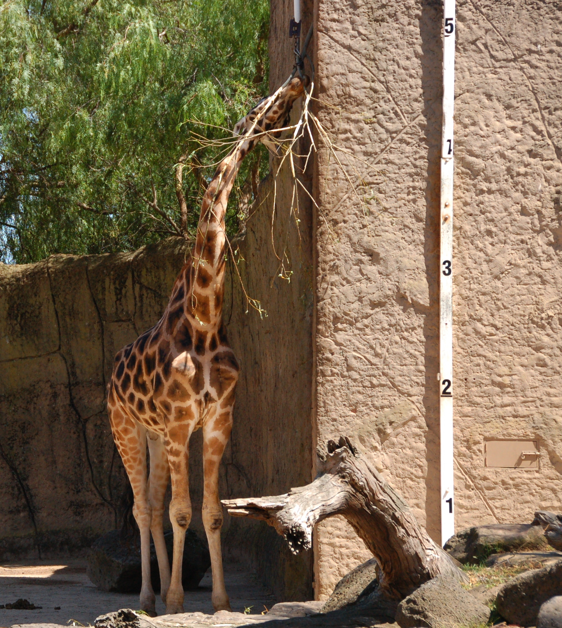 5 metres